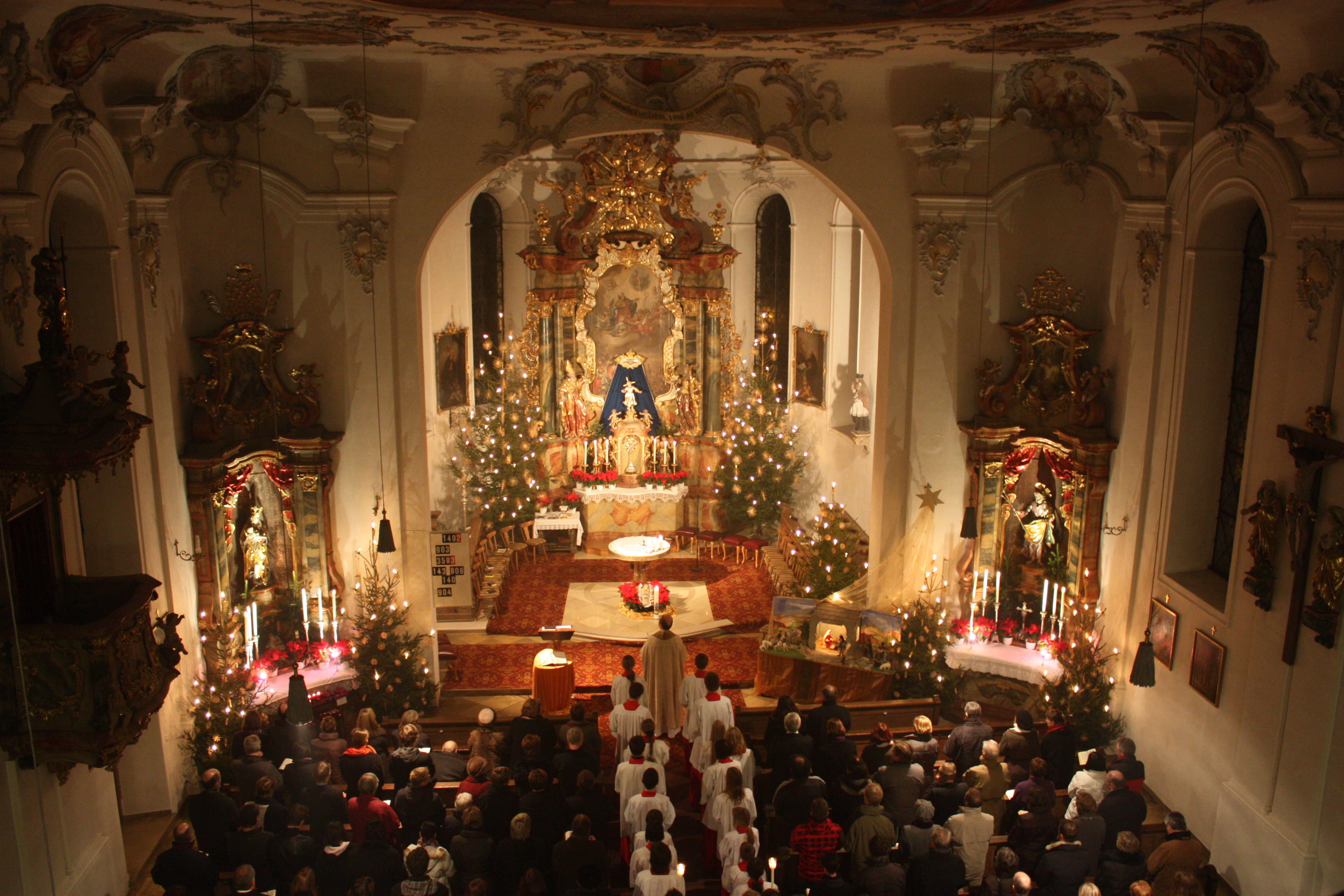 Hauptschiff von St. Ulrich in Amendingen bei Memmingen an der Weihnachtsmette 2009